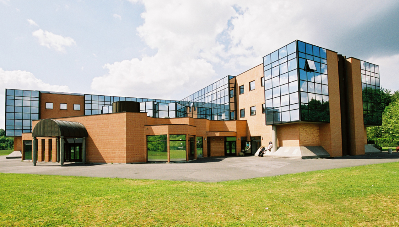 CFA UTEC